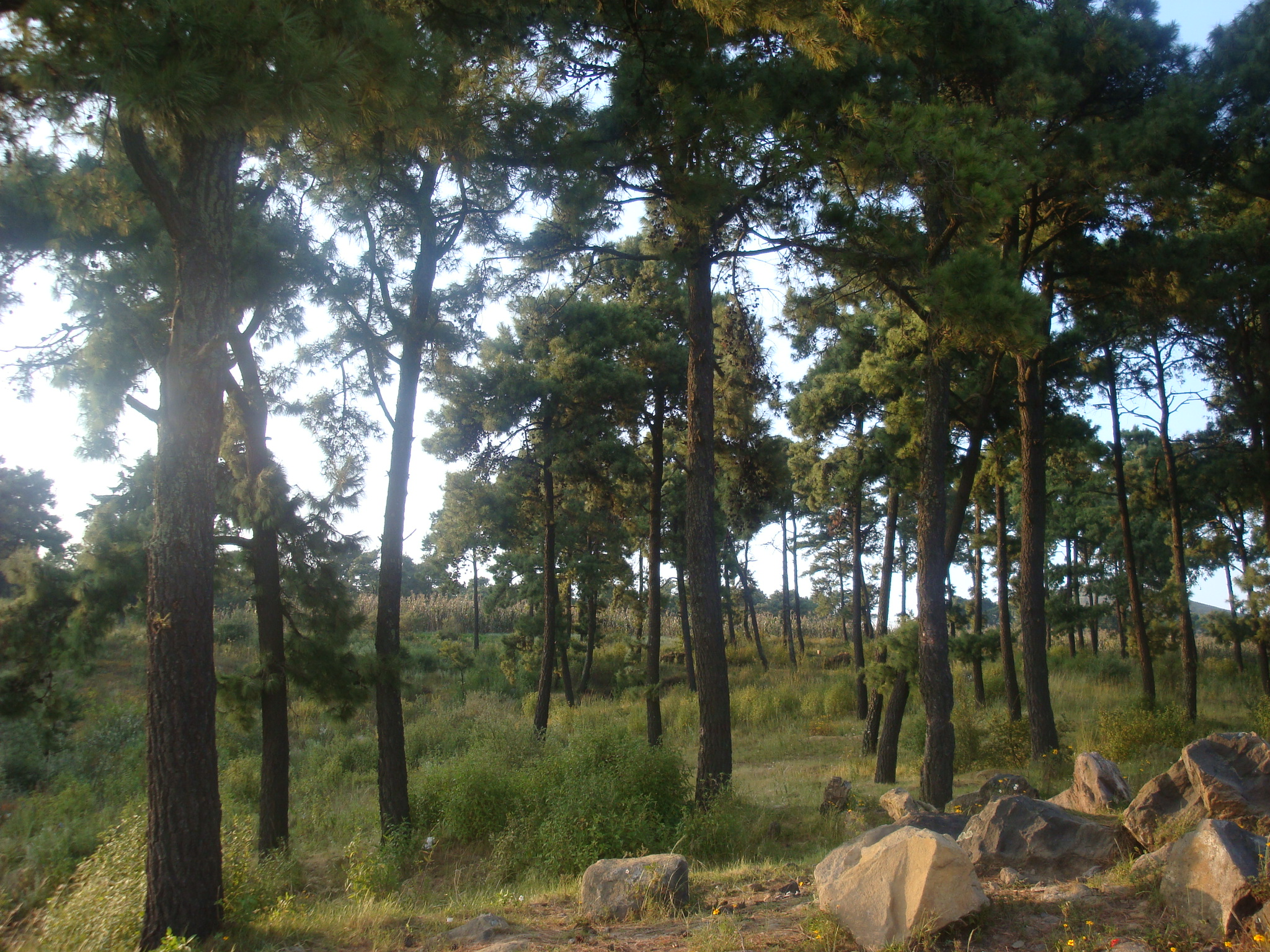 En los cerros de San Matías Cuijingo...